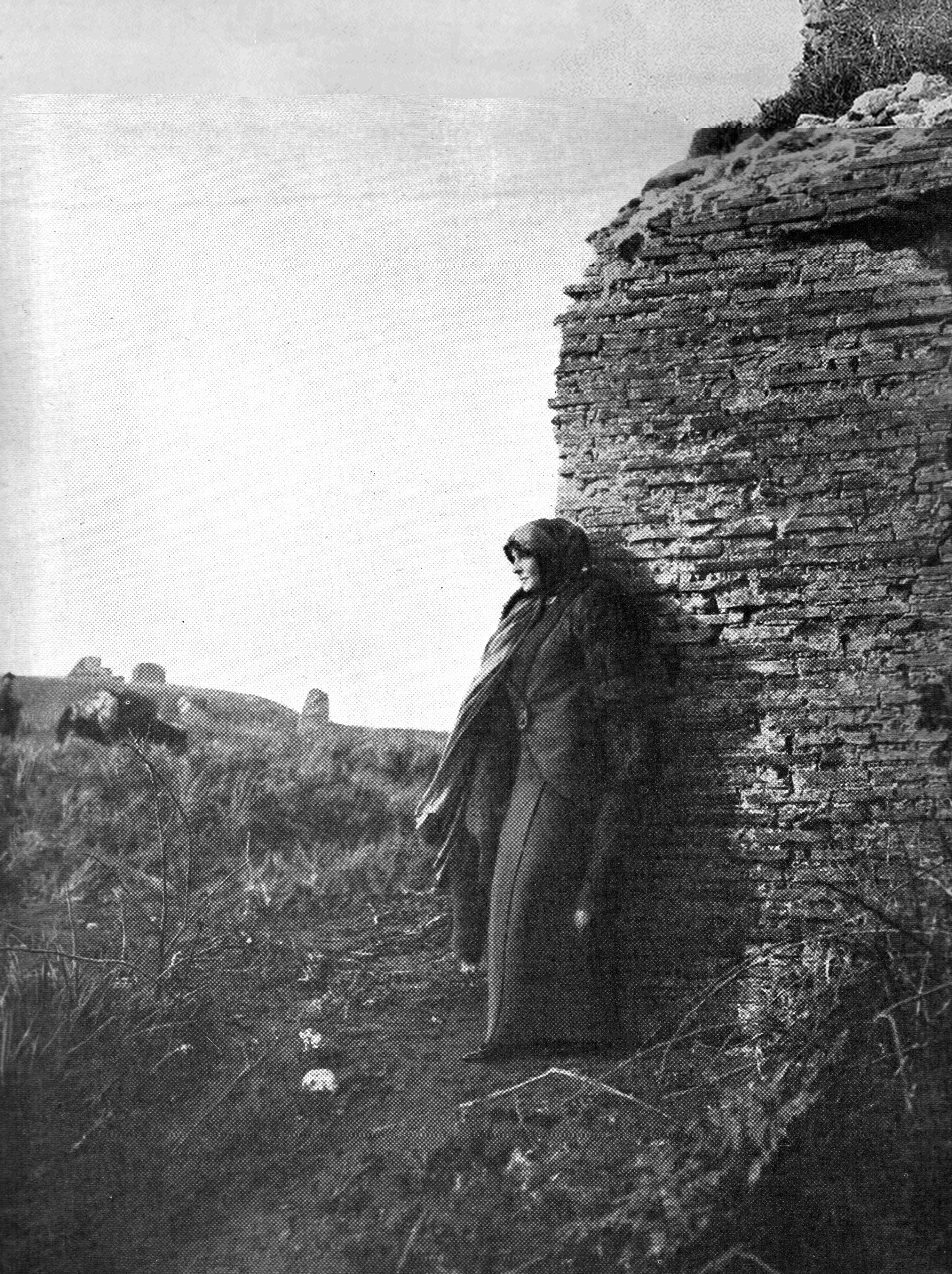 LES SOUVENIRS DE L'ÉPOPÉE, A NICOPOLIS. — La princesse Marie Bonaparte (Georges de Grèce) visite les lieux où furent ensevelis, en 1798, parmi les ruines antiques, les héroïques défenseurs français de Preveza. — Phot. S. Vlasto.